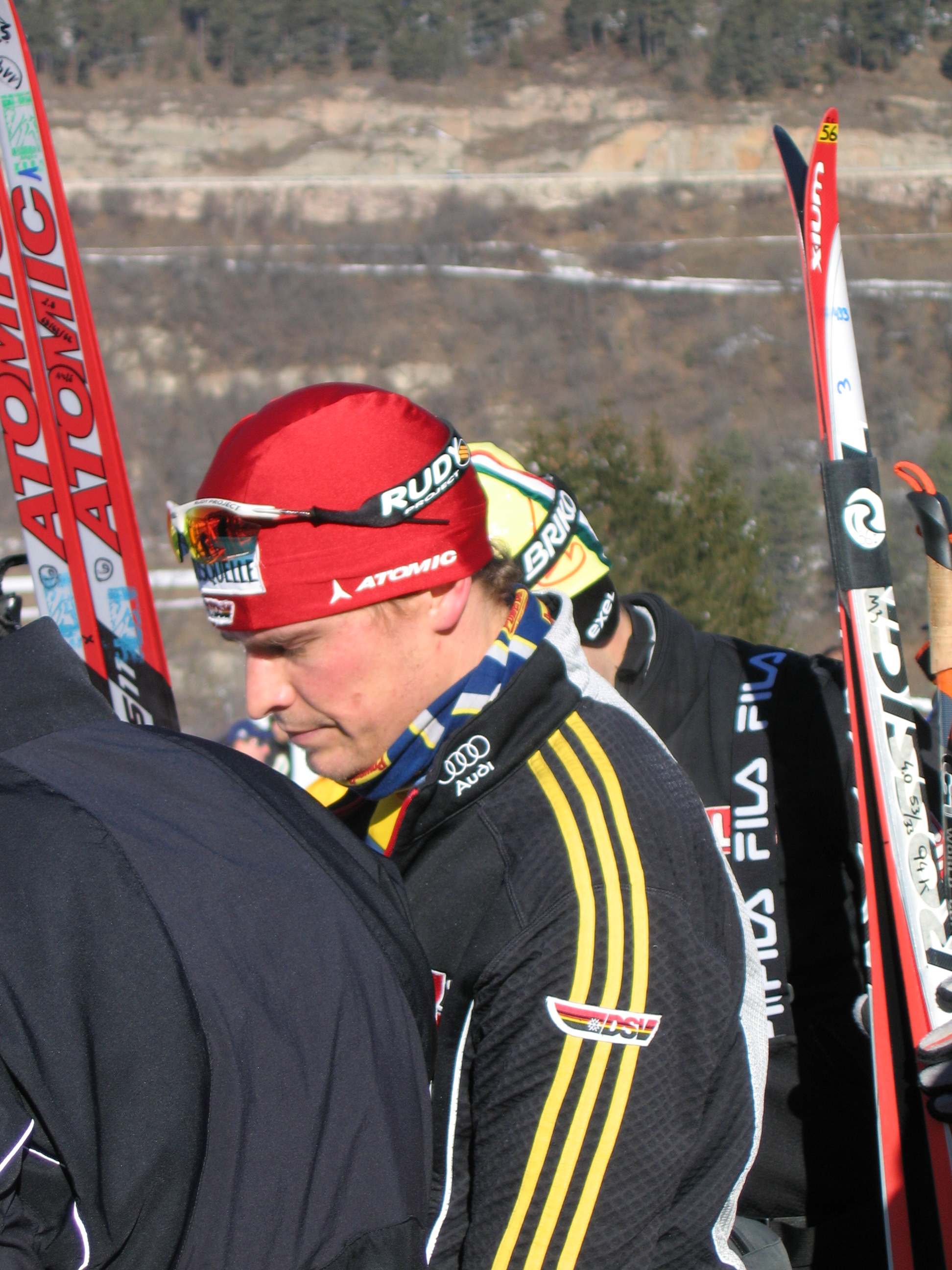 Italian skier Tobias Angerer.